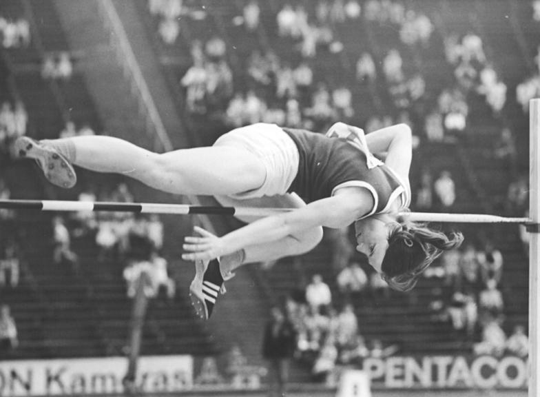 Rosemarie Witschas ADN-ZB Gahlbeck 1.6.74-Kr.-Jena: Rosemarie Witschas übesprang 1.91 m. Die 22jährige Rosemarie Witschas vomn SC Cottbus stellte am 1.6.74 bei einem internationalen Leichtathletik-Sportfest im Jenaer Ernst-Abbe-Sportfeld mit 1,91 m einen neuen DDR-Rekord im Hochsprung auf. (Foto zeigt sie bei einem früheren Wettkampf) .